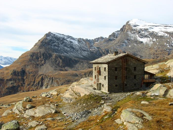 Vue du refuge.